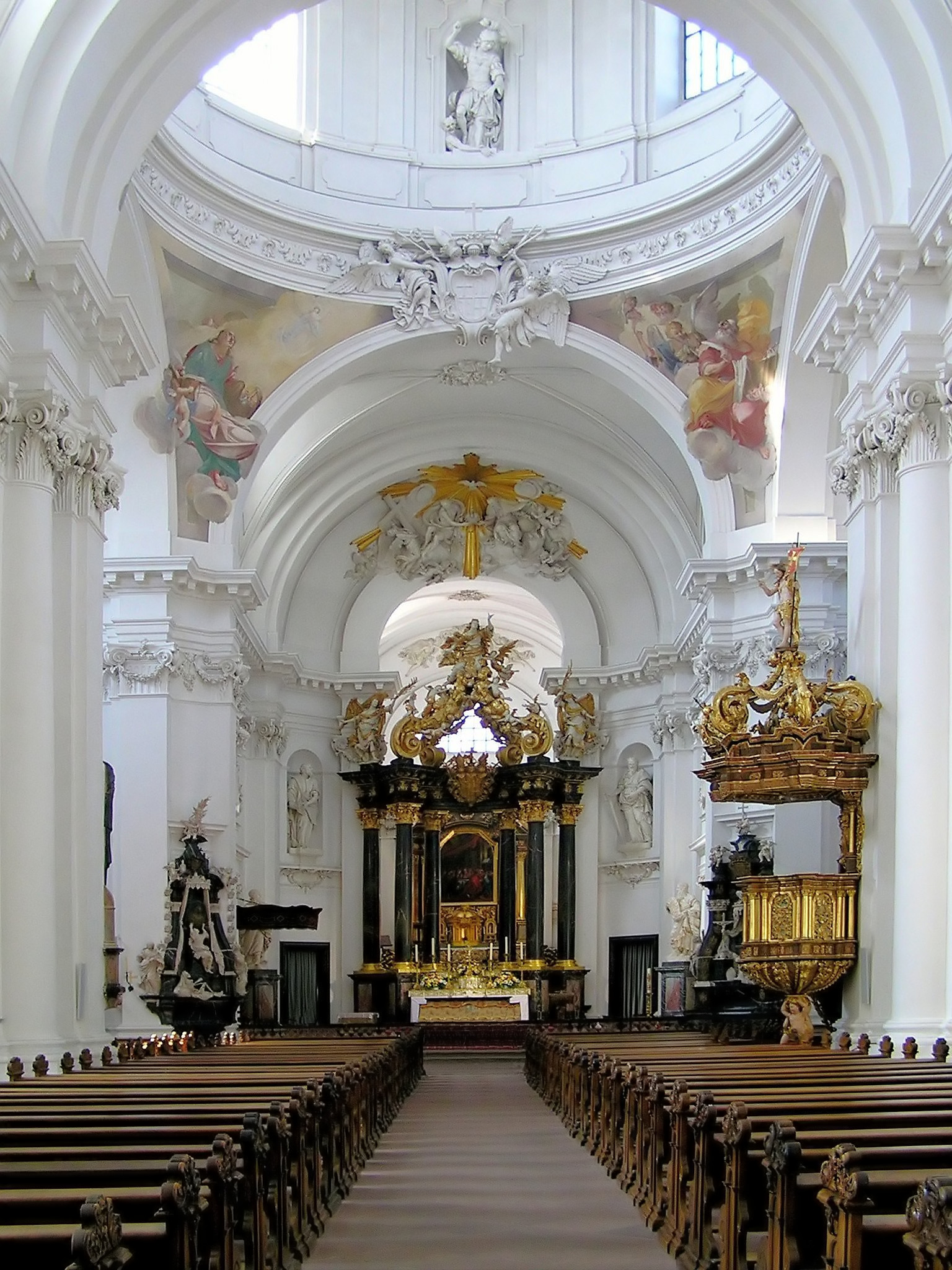 Fuldaer Dom, Innenansicht